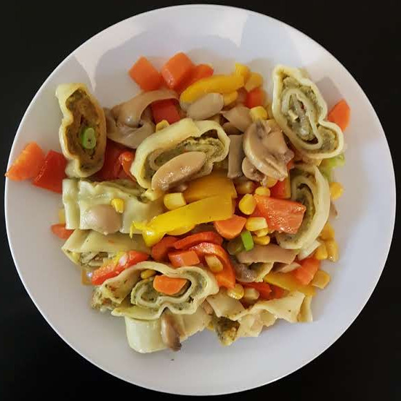 Gebratene Maultaschen mit Gemüse